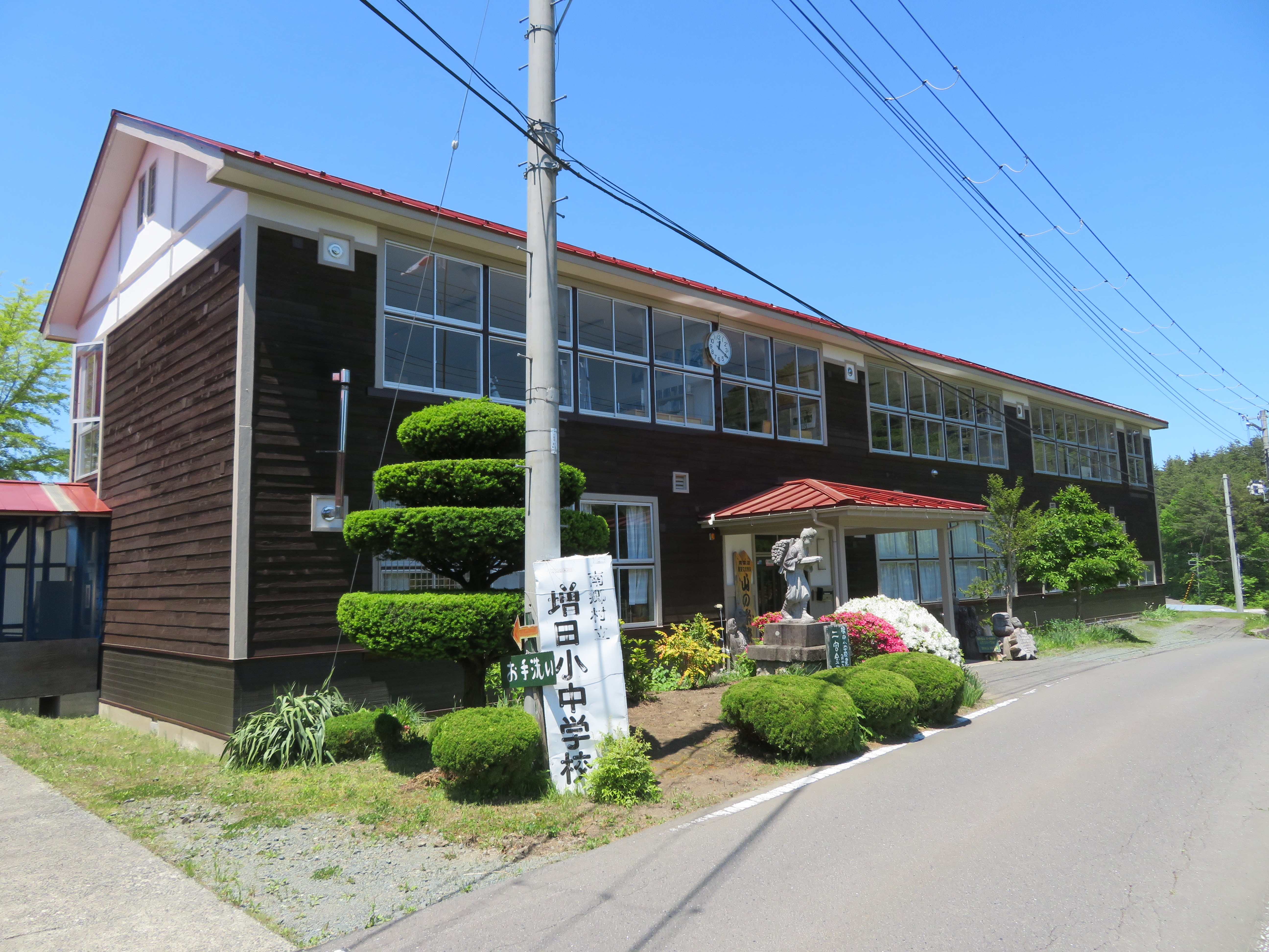 青森県八戸市に所在する山の楽校（旧南郷村立増田小中学校校舎） Canon PowerShot SX720 HS